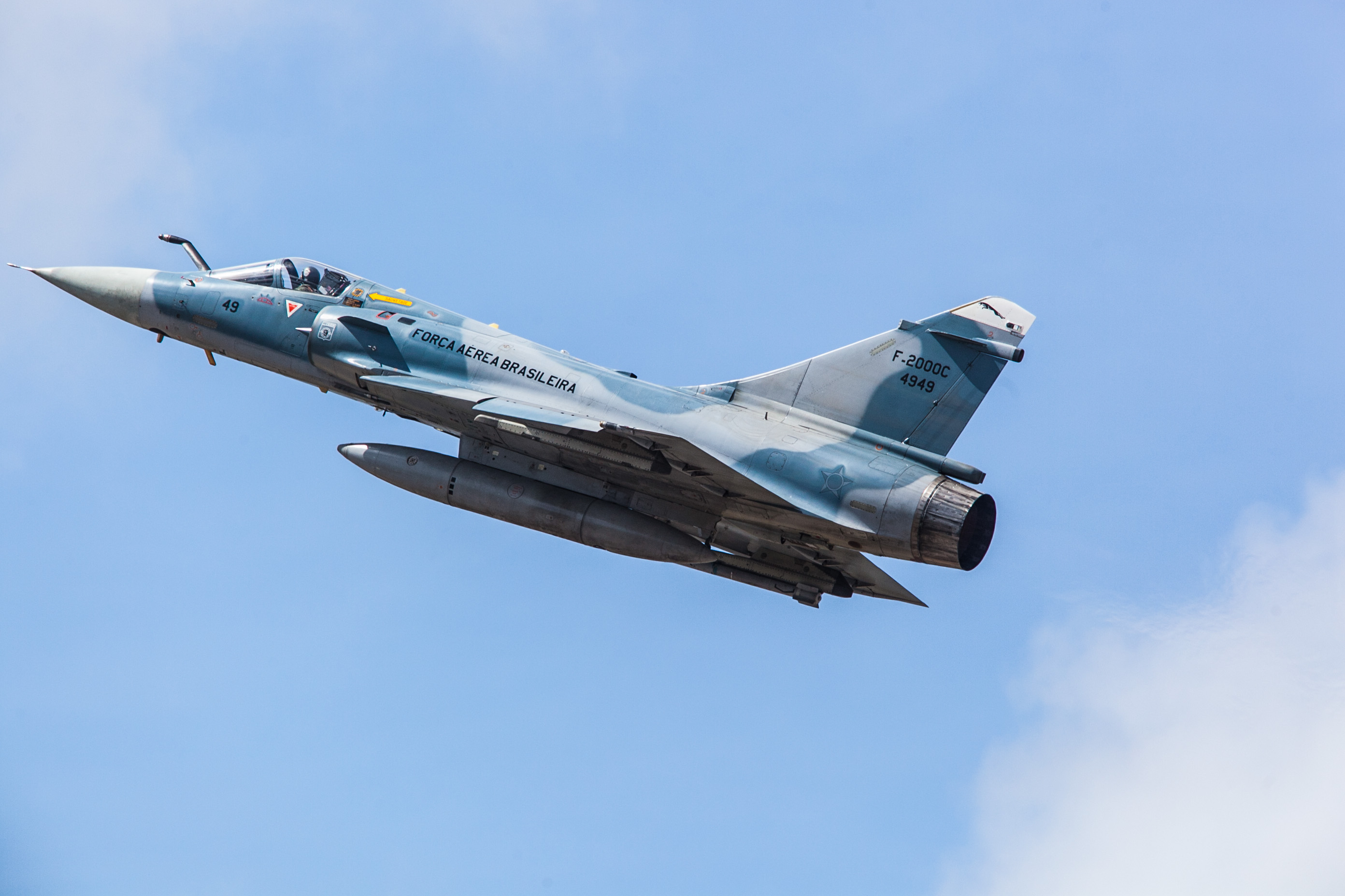 Fotos Felipe Barra/MD